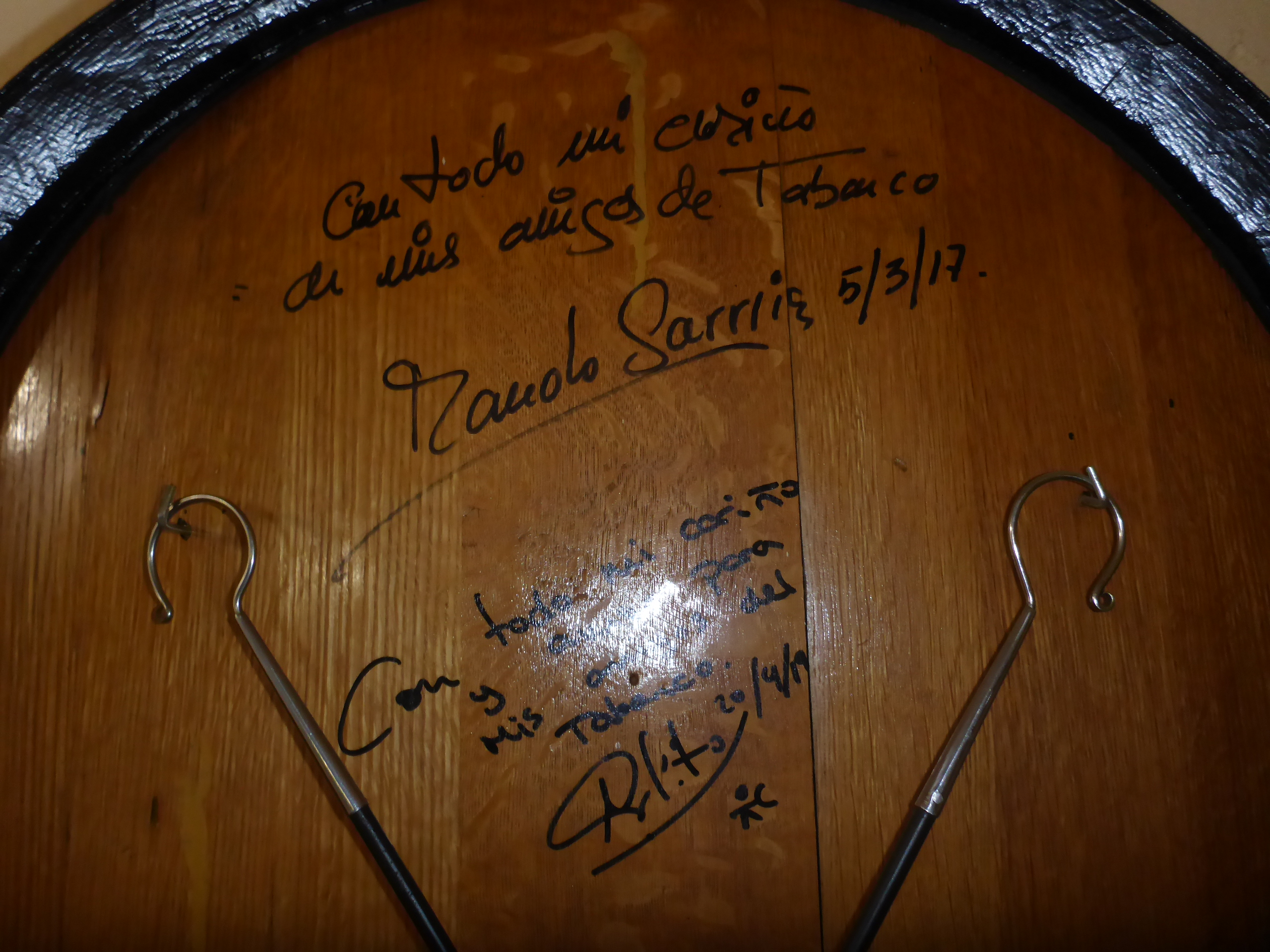 Dedicatoria de Manuel Sarriá (Restaurante "El Tabanco" en El Bosuqe, Cádiz)